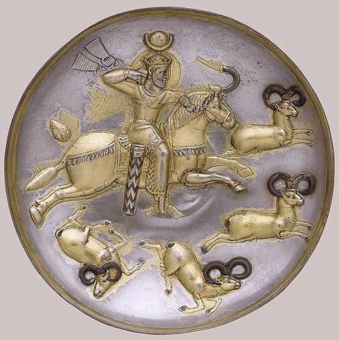 بشقاب نقره‌ای شکارگاه شاپور دوم